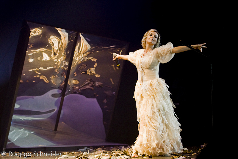 Luiza Possi ao vivo no Rio de Janeiro em 2009.